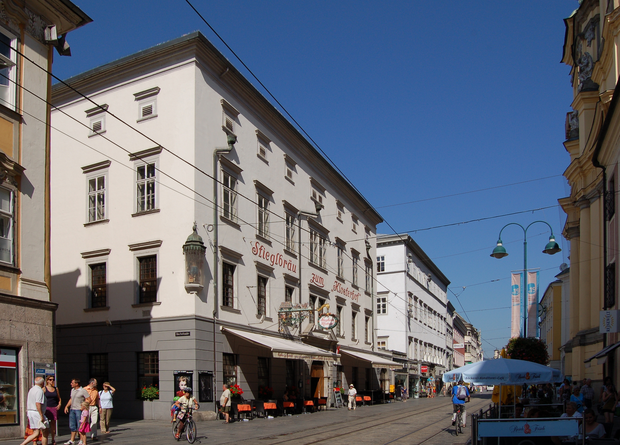 Der Klosterhof in der Landstraße 30 in Linz (Oberösterreich).